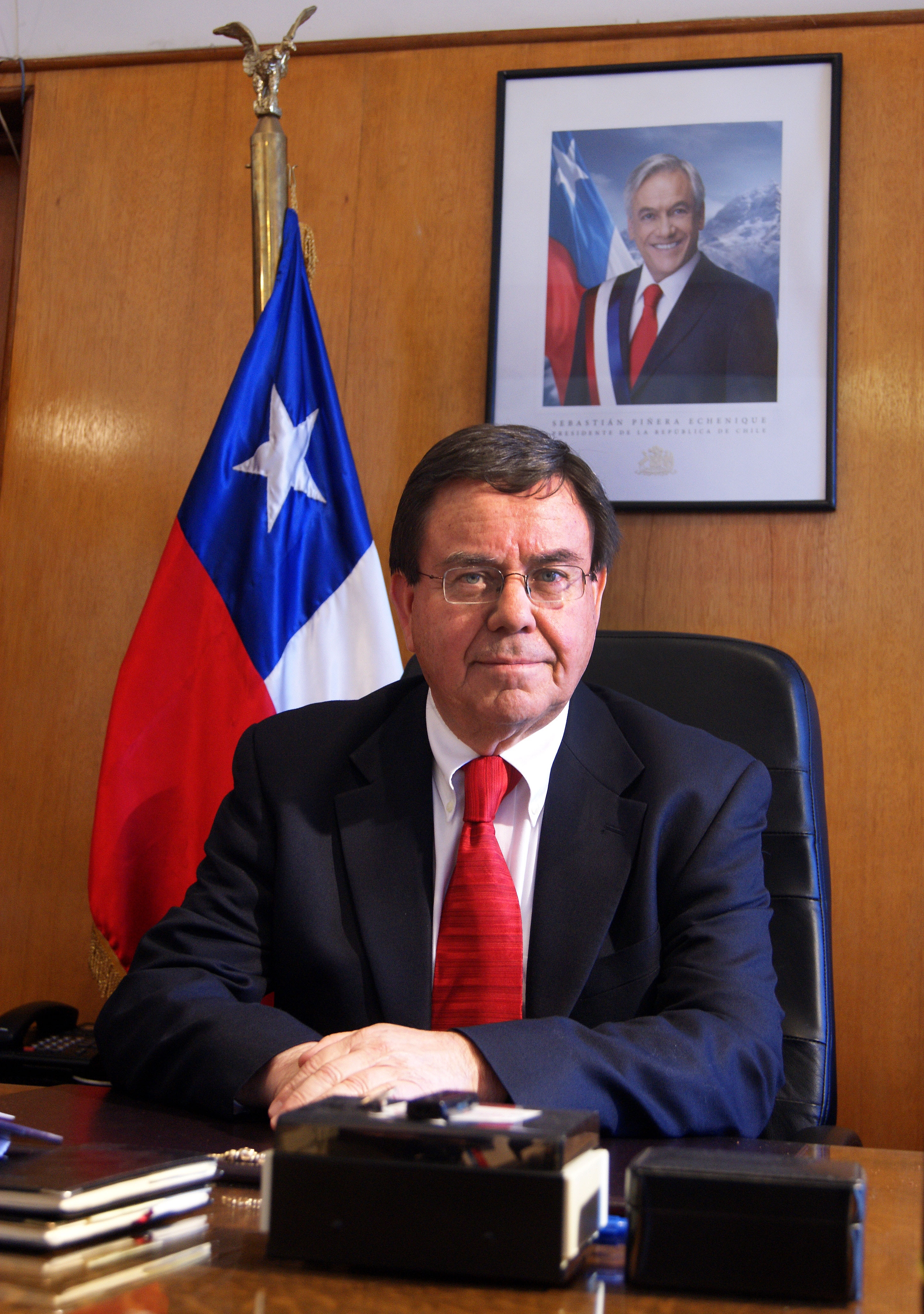 Víctor Lobos del Fierro, intendente de la Región del Biobío.